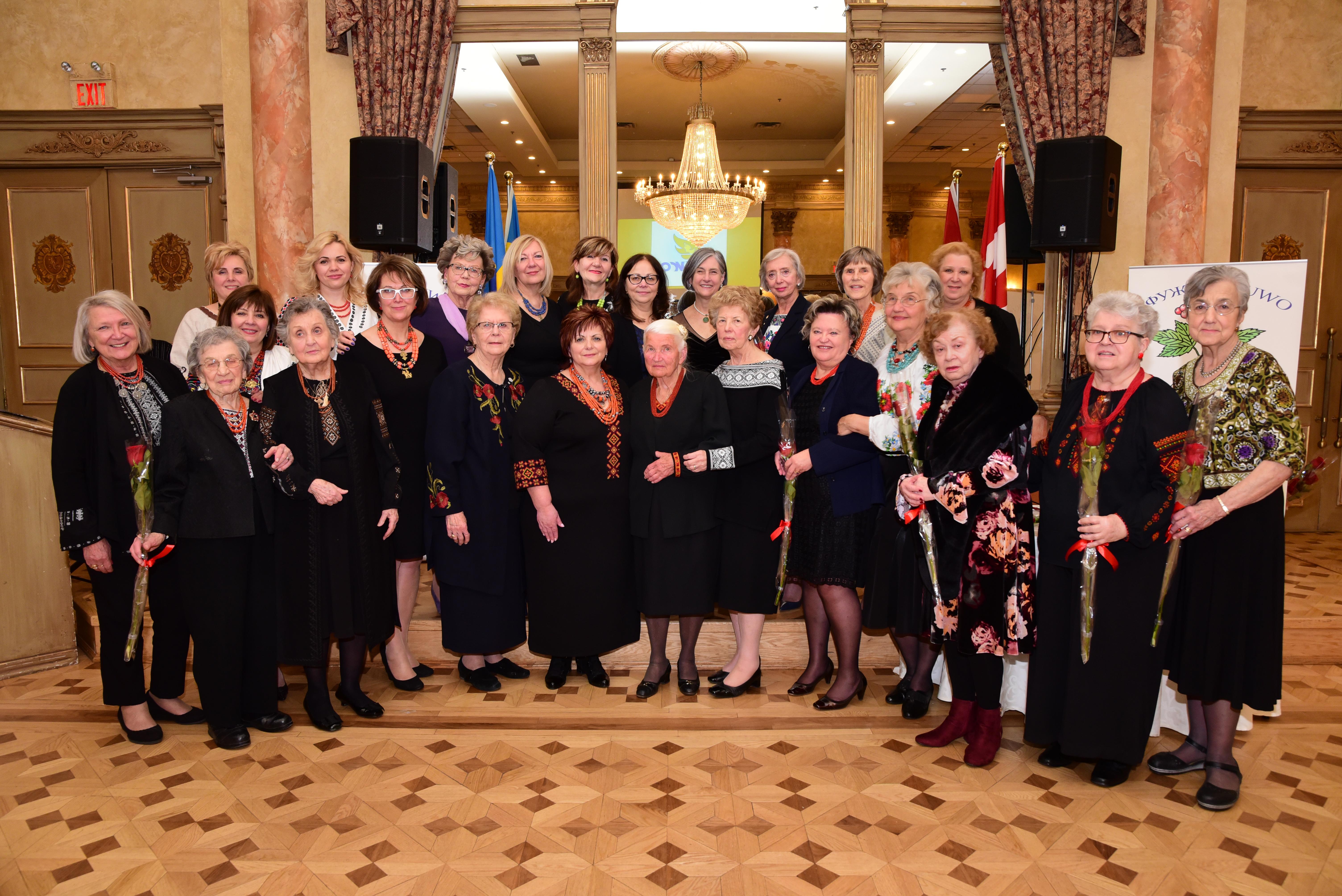 Пам'ятна фотографія членкинь на святкуванні 70-річчя СФУЖО в Торонто 24 березня 2019